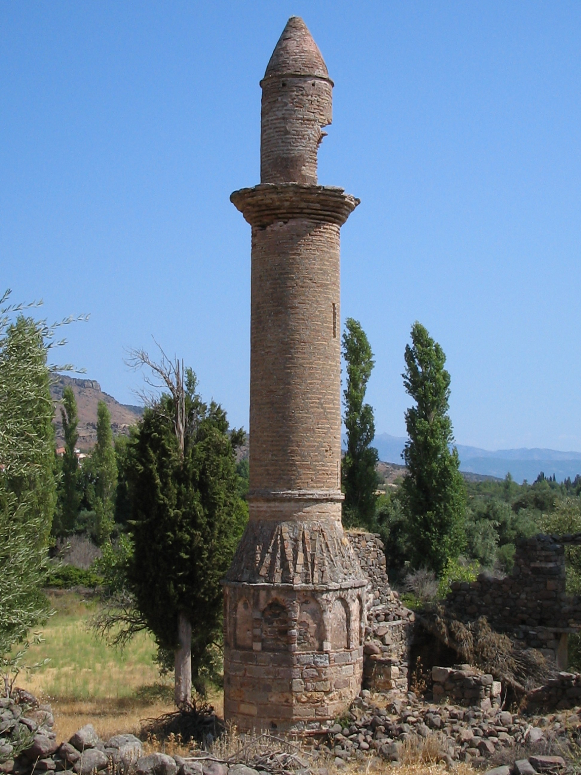 Minaret in Paraklia, Lesbos, Greece